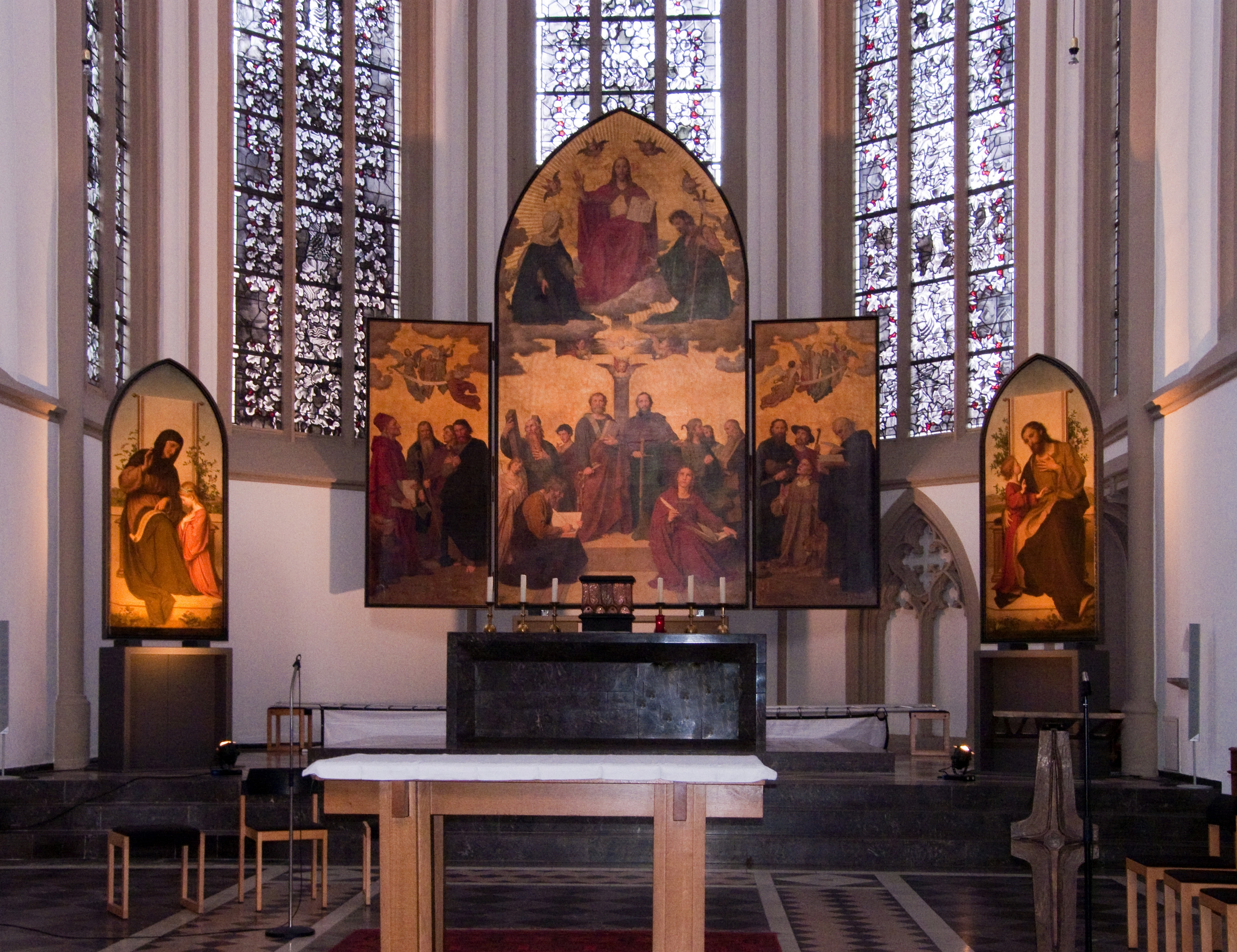 Altar der Remigiuskirche in Bonn